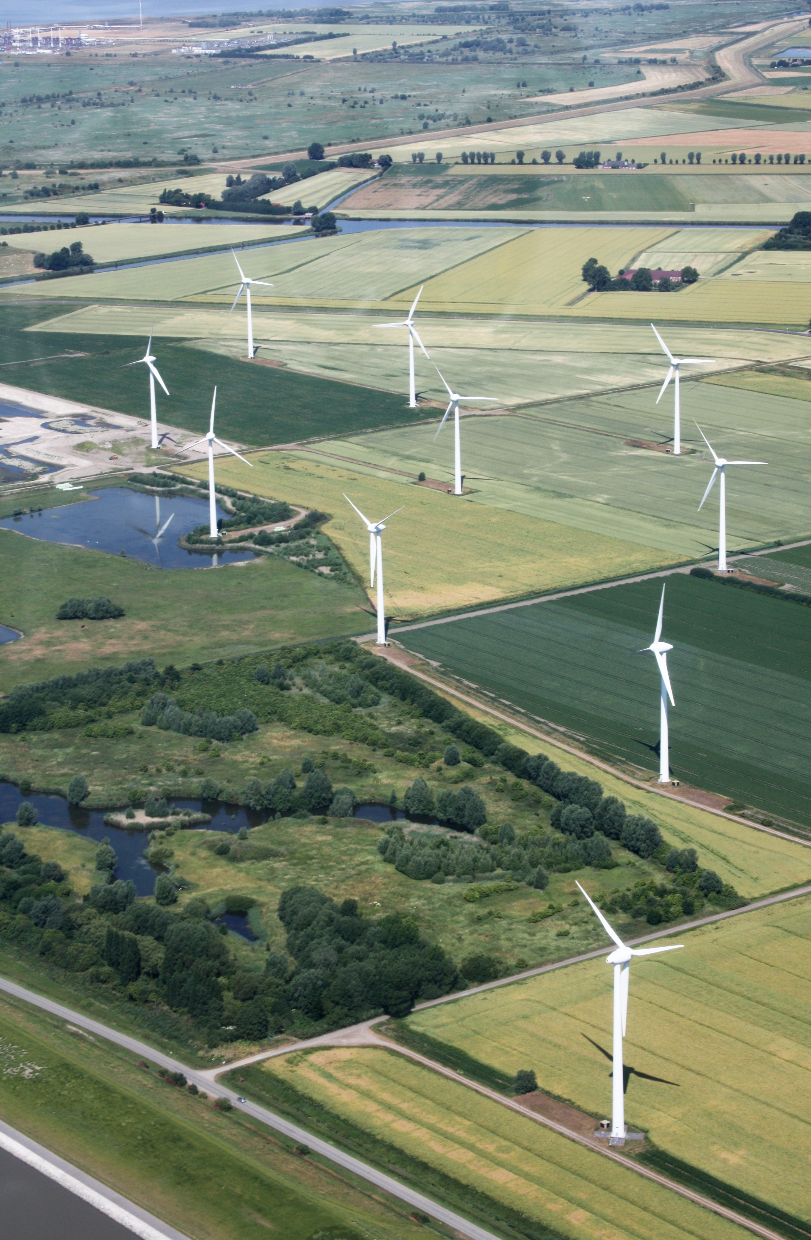 Windpark Wybelsumer Polder – Flug von Emden zum Pilsumer Leuchtturm; Flughöhe 1500 ft; Juli 2010; Originalfoto nachbearbeitet: Tonwertkorrektur und Bild geschärft mit Hochpassfilter